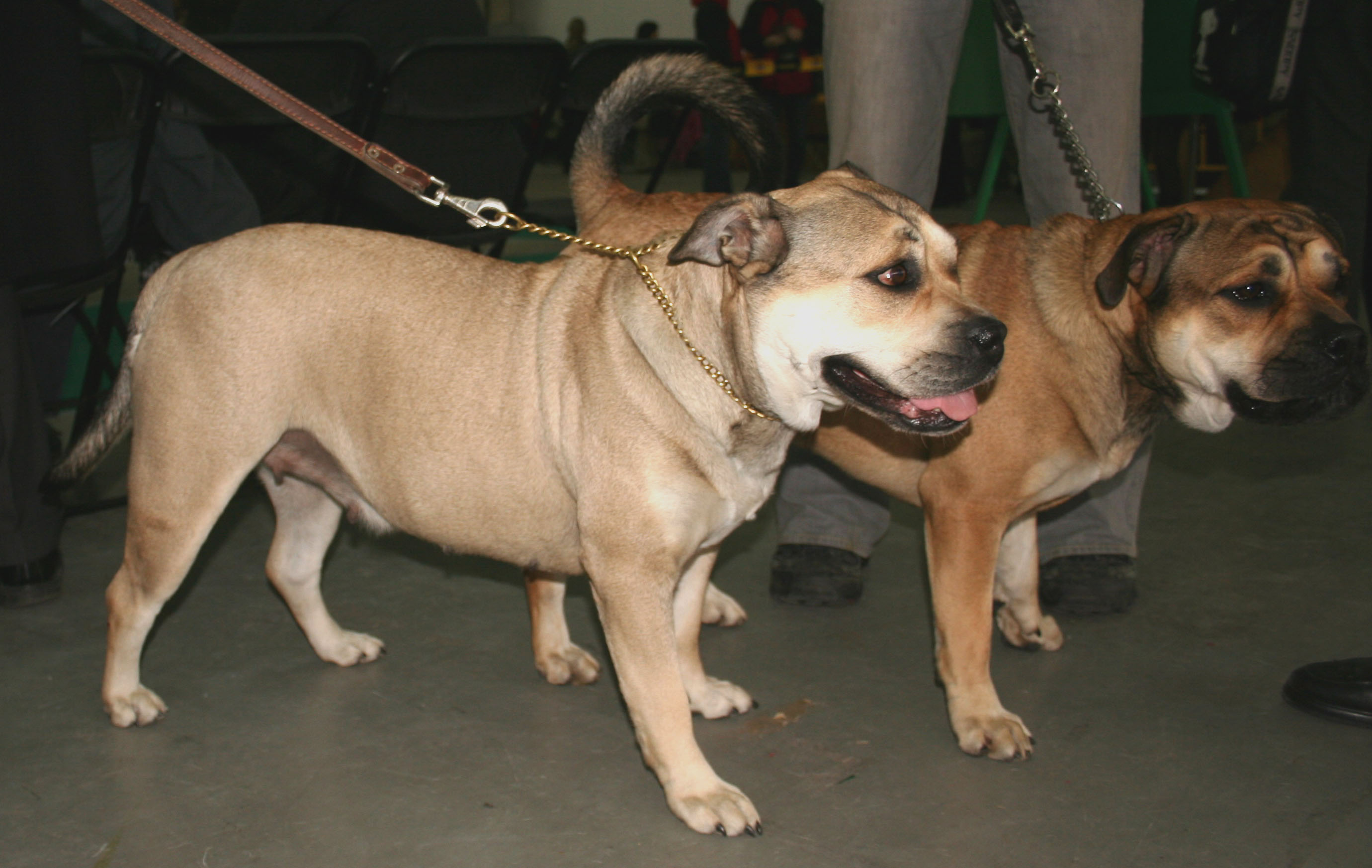 Ca_de_bou na Światowej Wystawie Psów Rasowych w Poznaniu